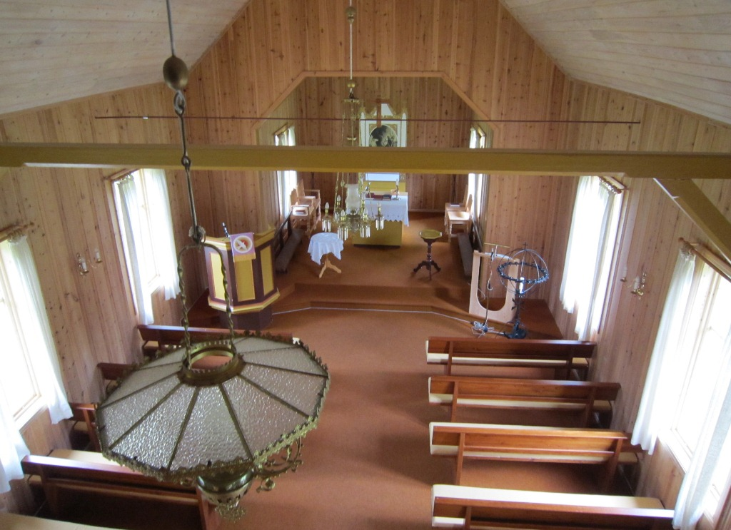 Kirkerommet i Tufsingdalen kirke